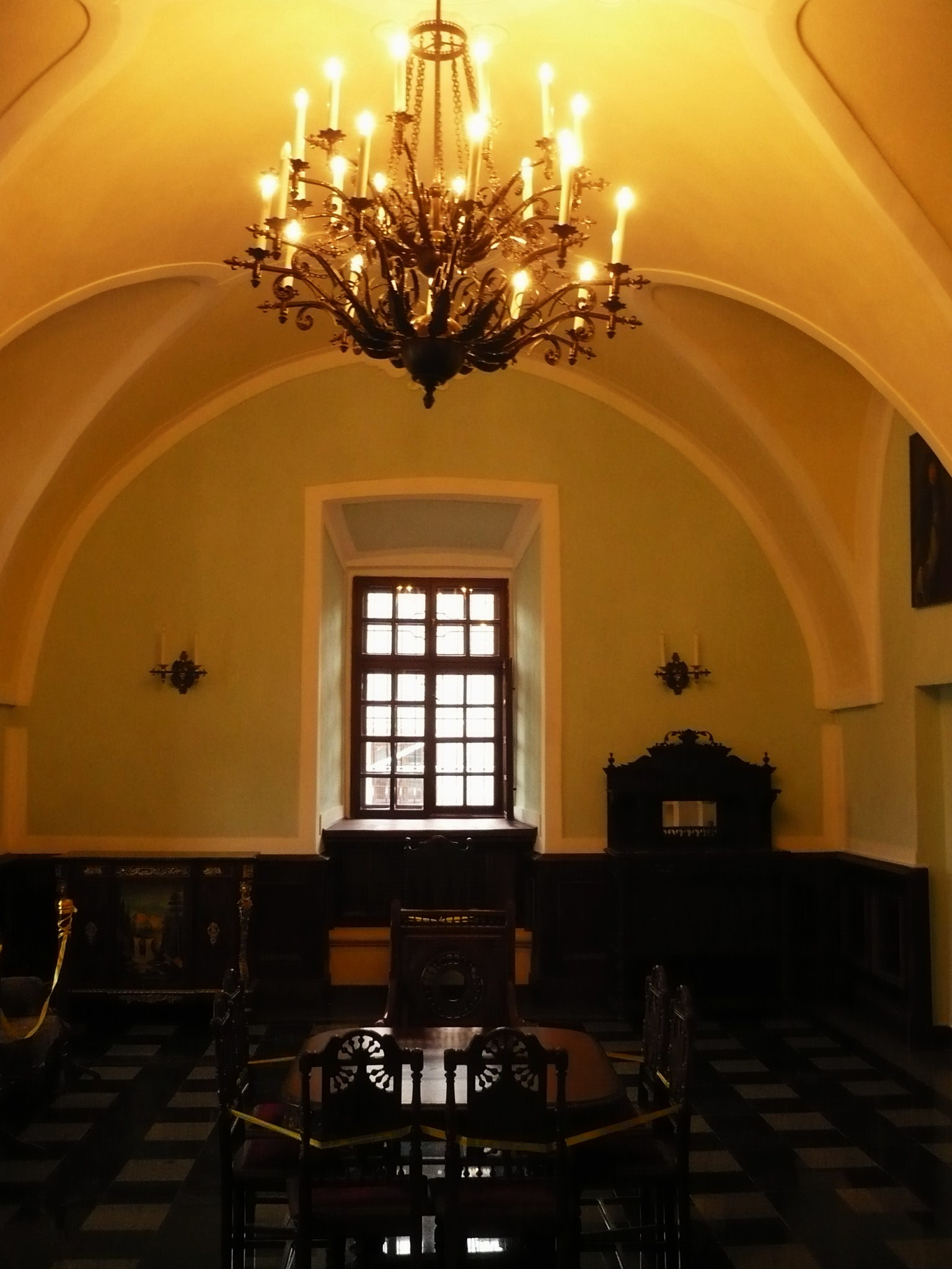 Zbaraż, sala zamku